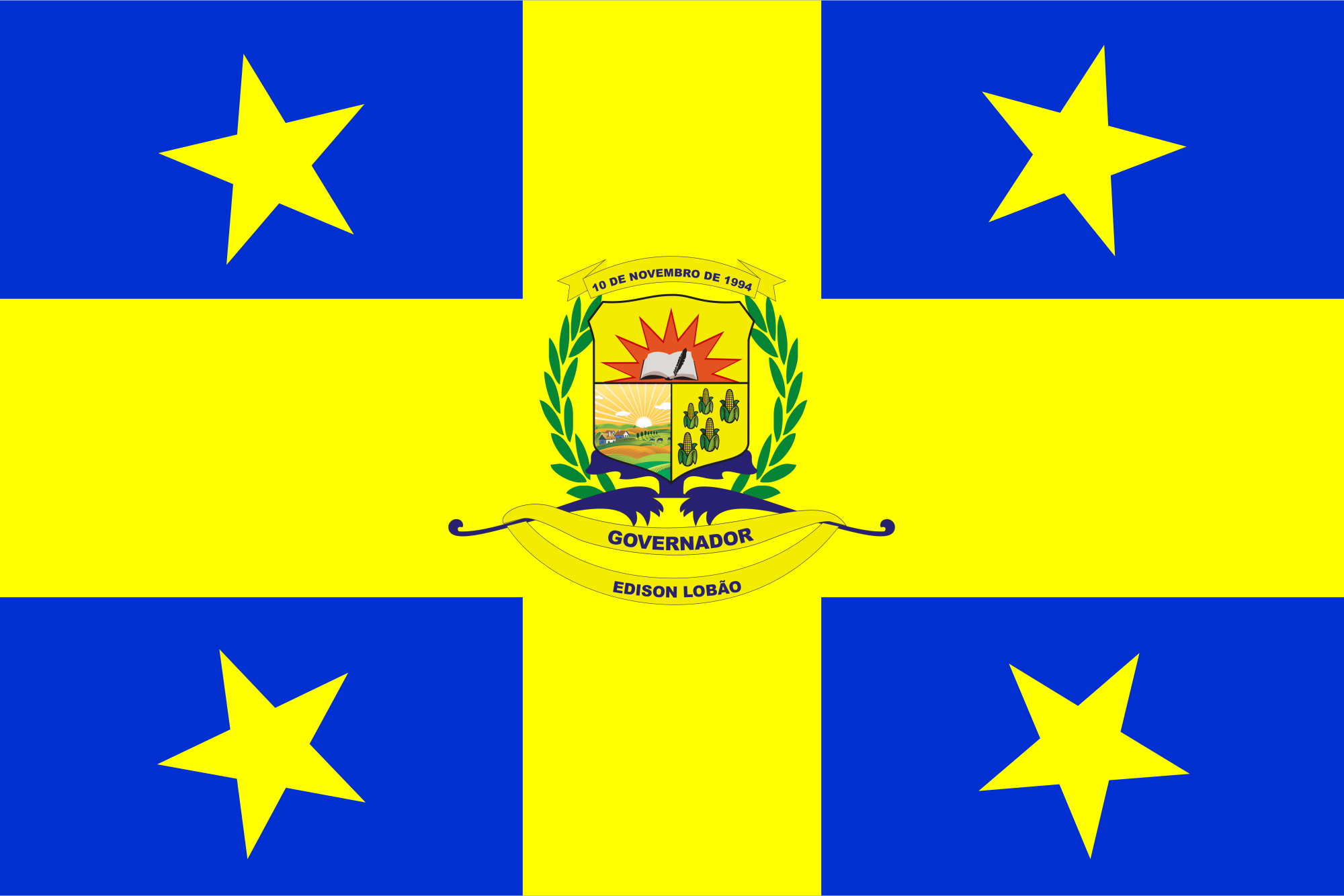 Bandeira do Municipio de Governador Edison Lobão - Maranhão, Brasil.